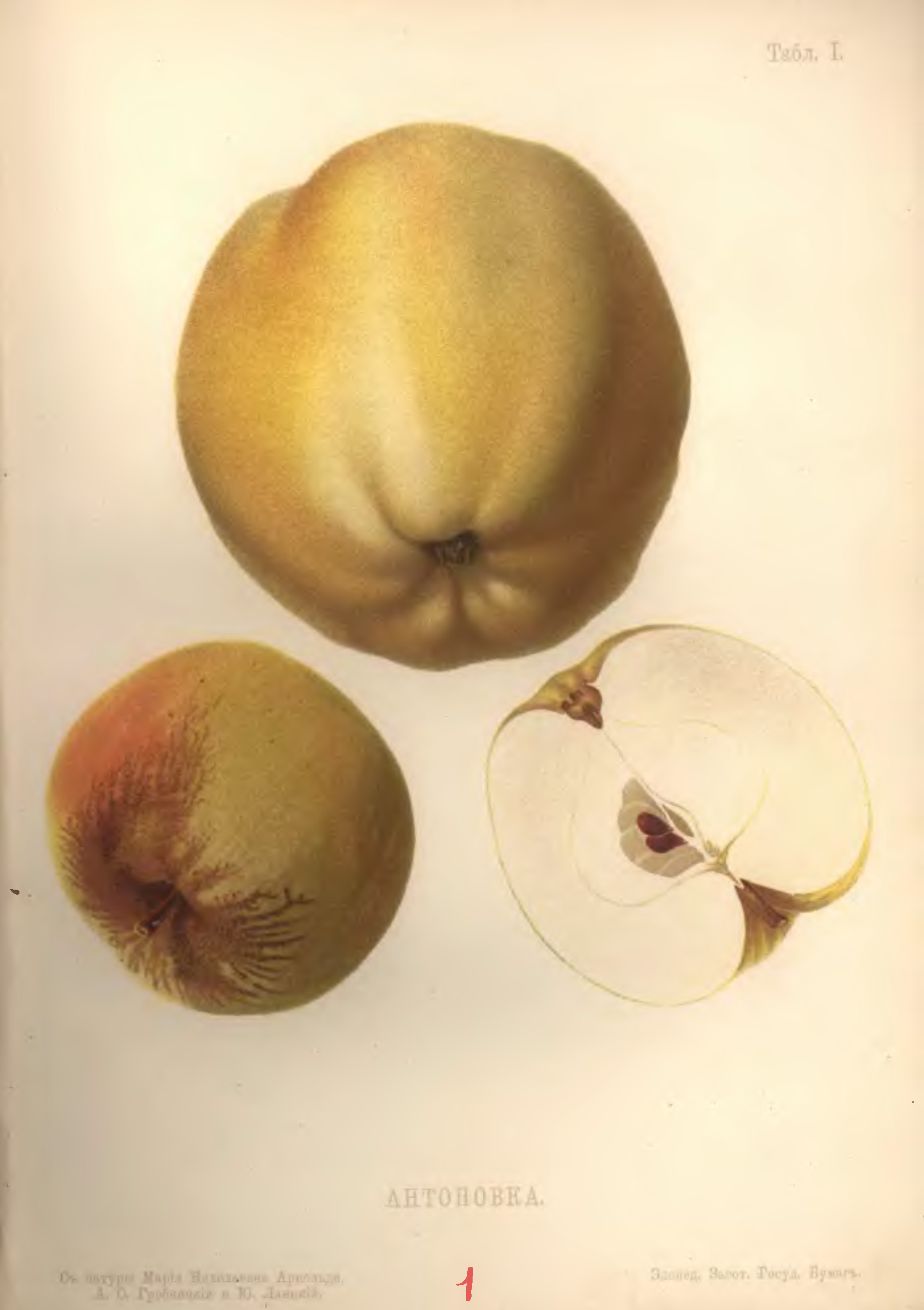 Антоновка